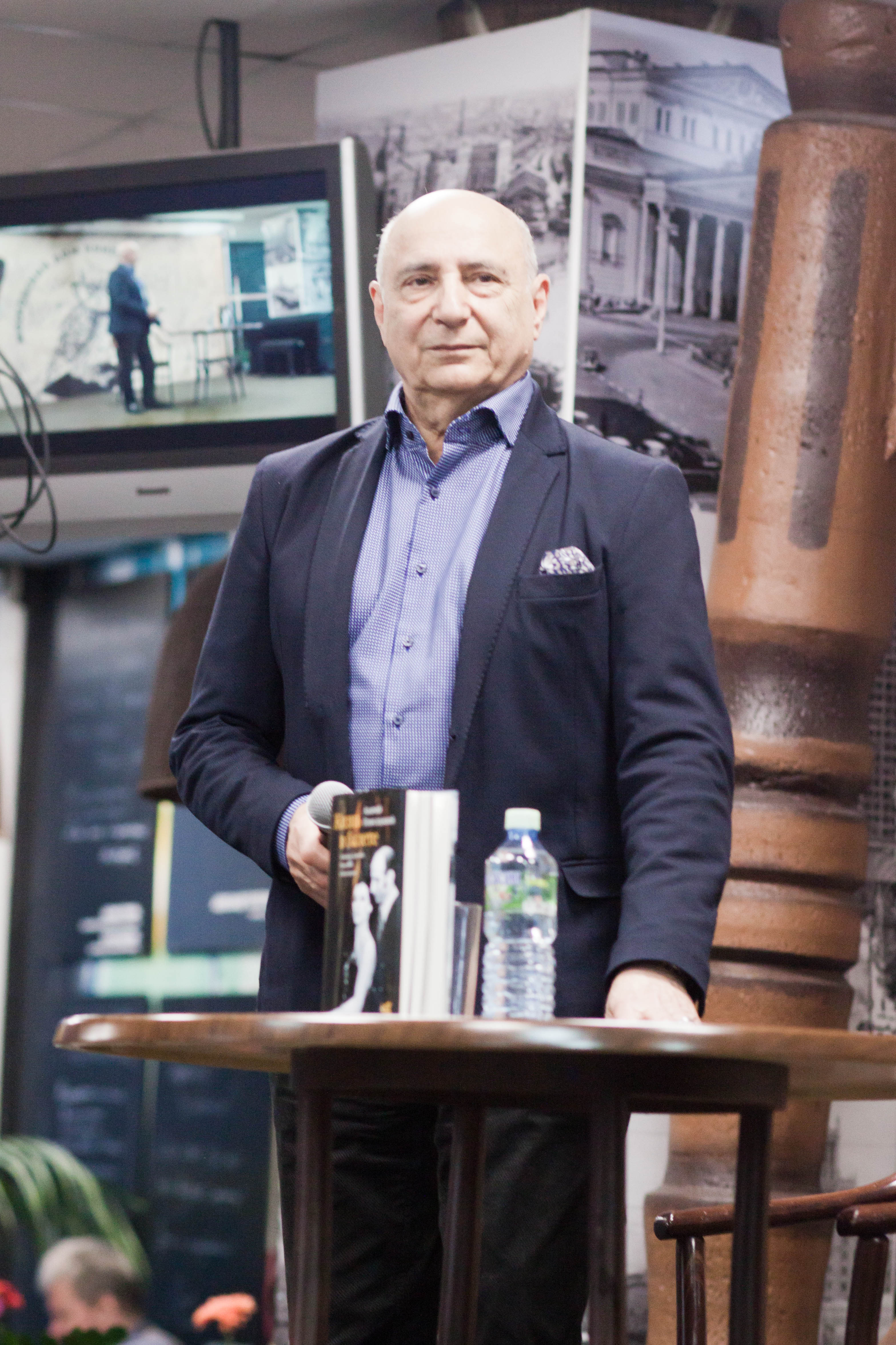 Азарий Плисецкий на презентации книги "Жизнь в балете" в "Московском доме книги" на Новом Арбате